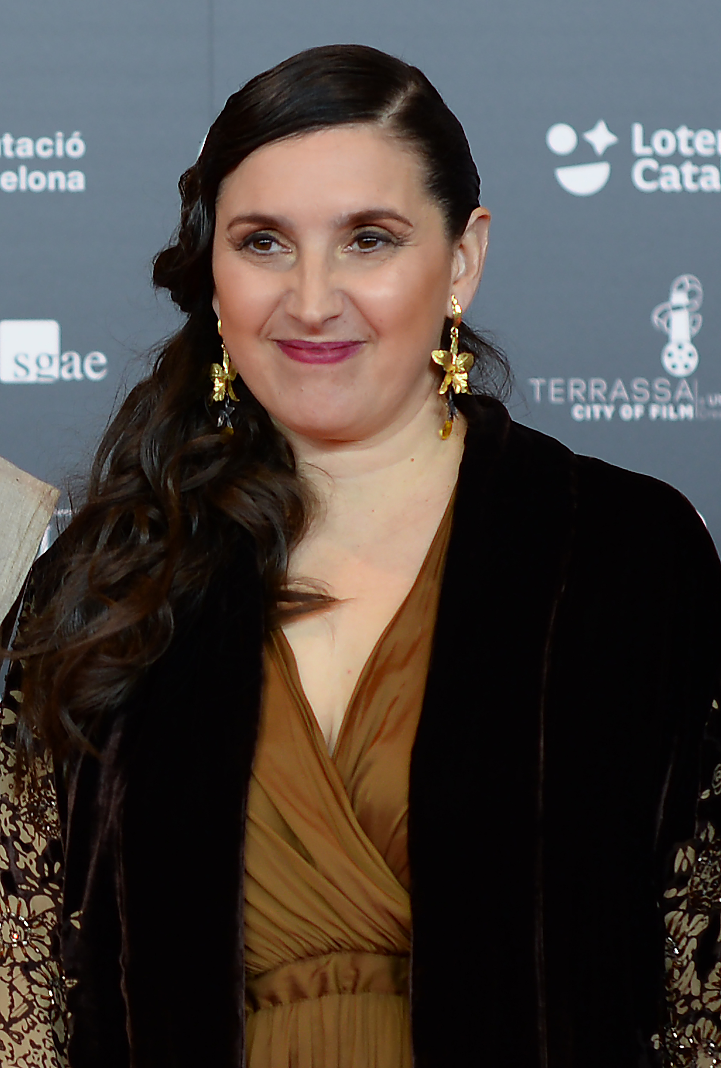 Núria Piferrer, Névoa, cantant, XII Premis Gaudí (2020)